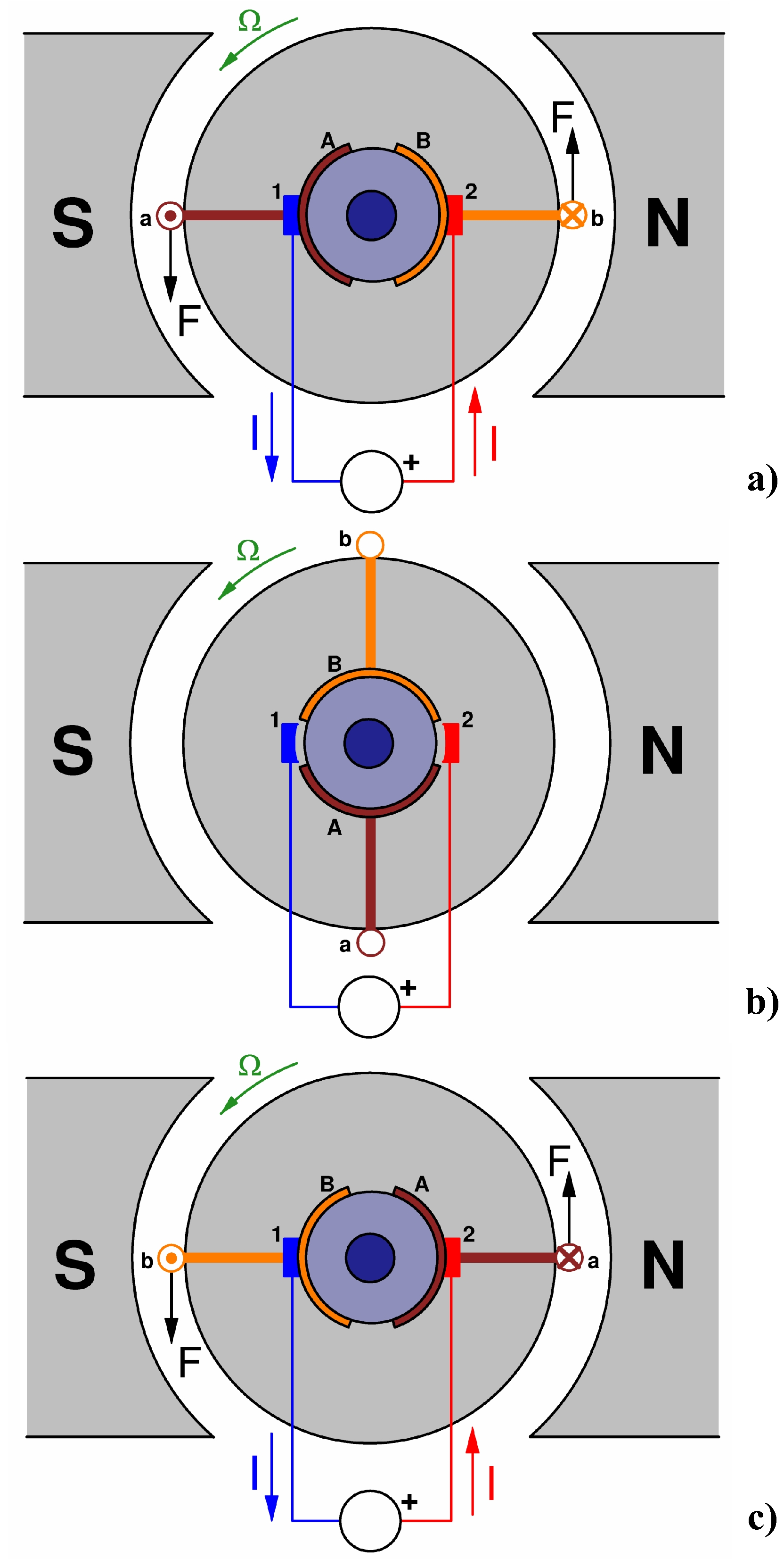 Dibujo que muestra el principio de funcionamiento de un motor de c.c. bipolar elemental con una sola bobina y dos delgas. Se muestran 3 posiciones de funcionamiento de la máquina. Entre cada dos posiciones el rotor ha girado 90º. 1, 2: Escobillas; A, B: Delgas; a, b: Lados de la bobina unidos respectivamente a las delgas A y B.